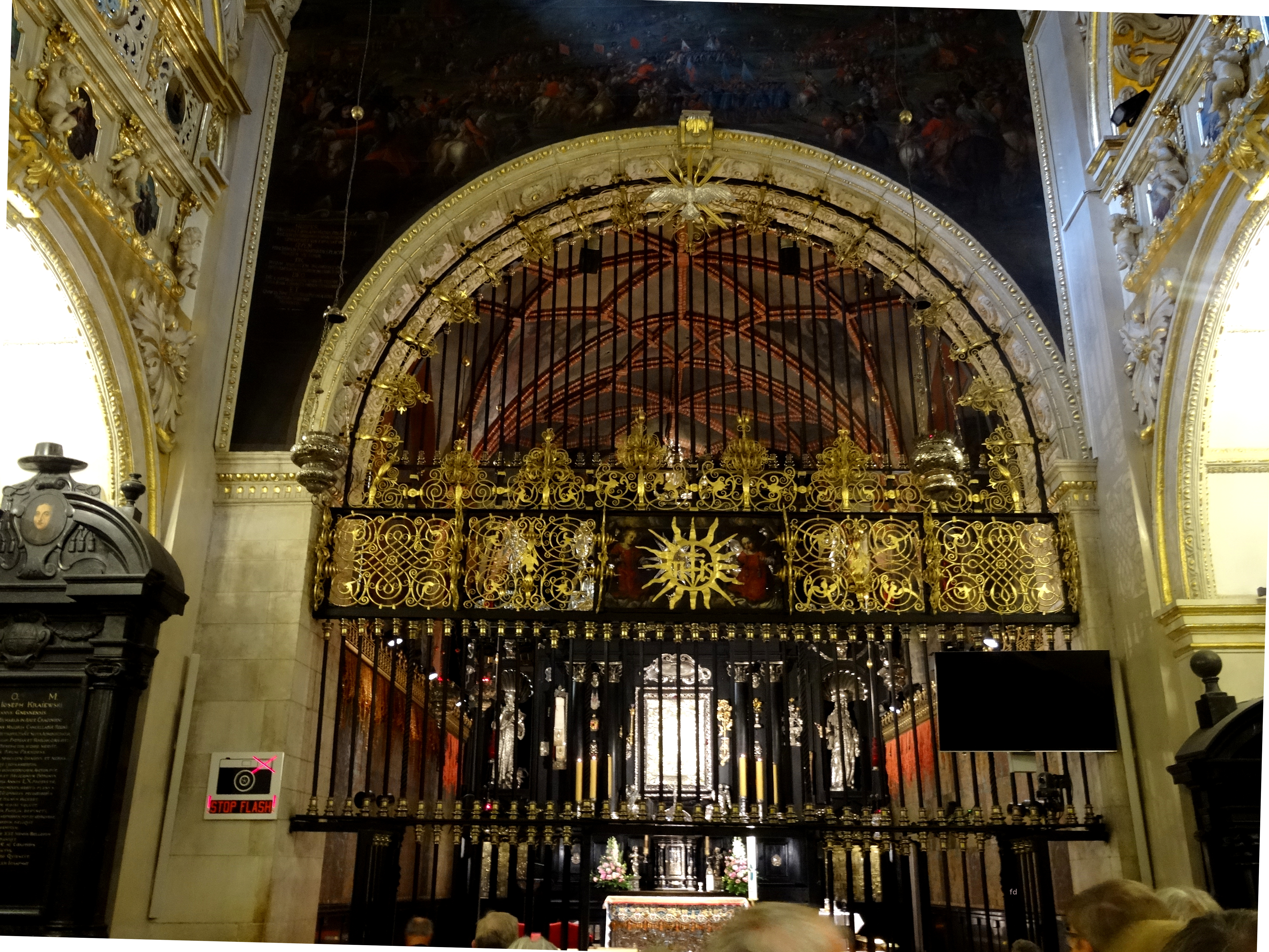 Pauliner Kloster Tschenstochau Kapelle der Schwarzen Madonna